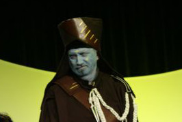 Papanoida Cropped